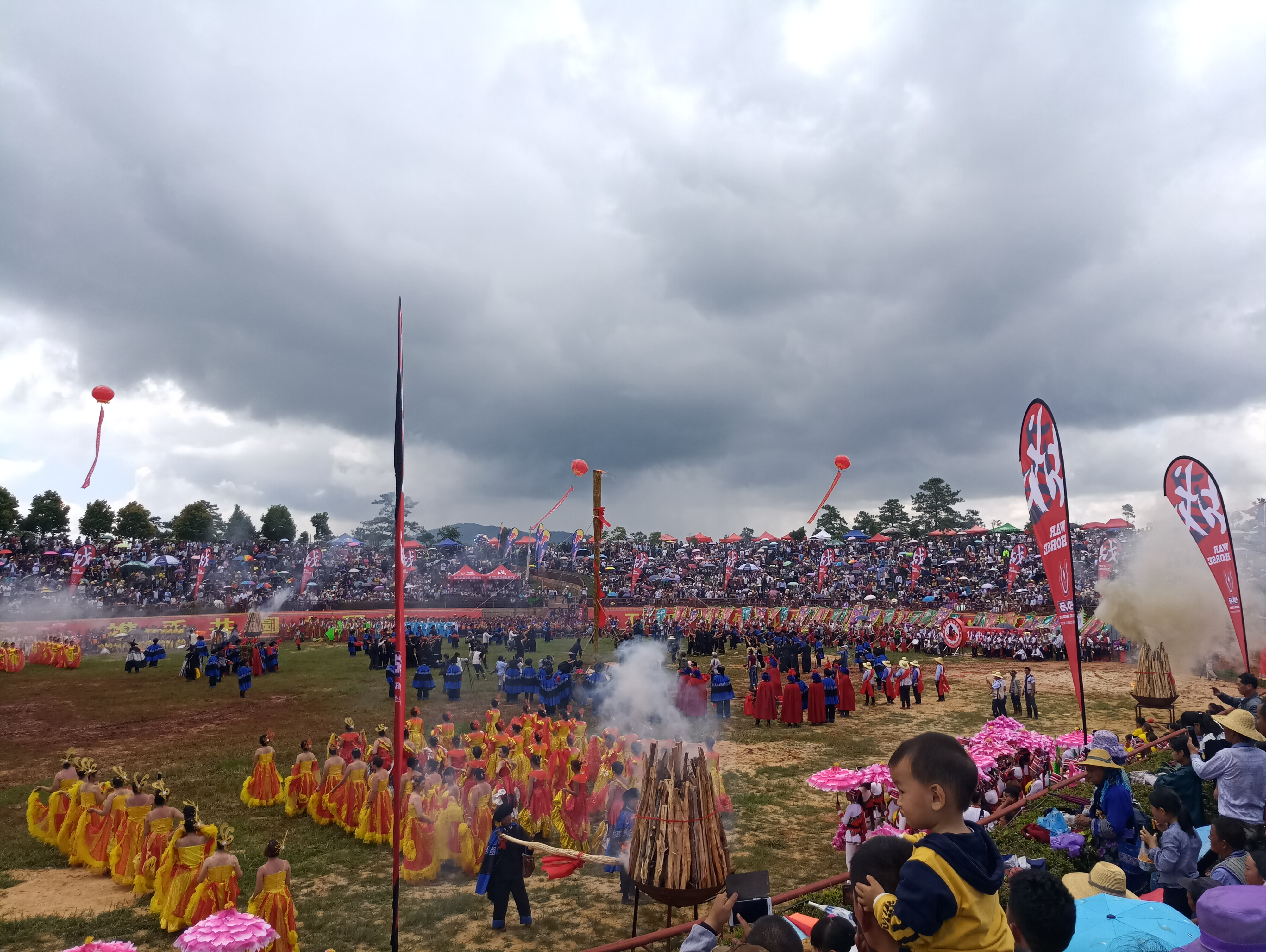 中文（中国大陆）: 2019中国石林火把狂欢节-长湖会场